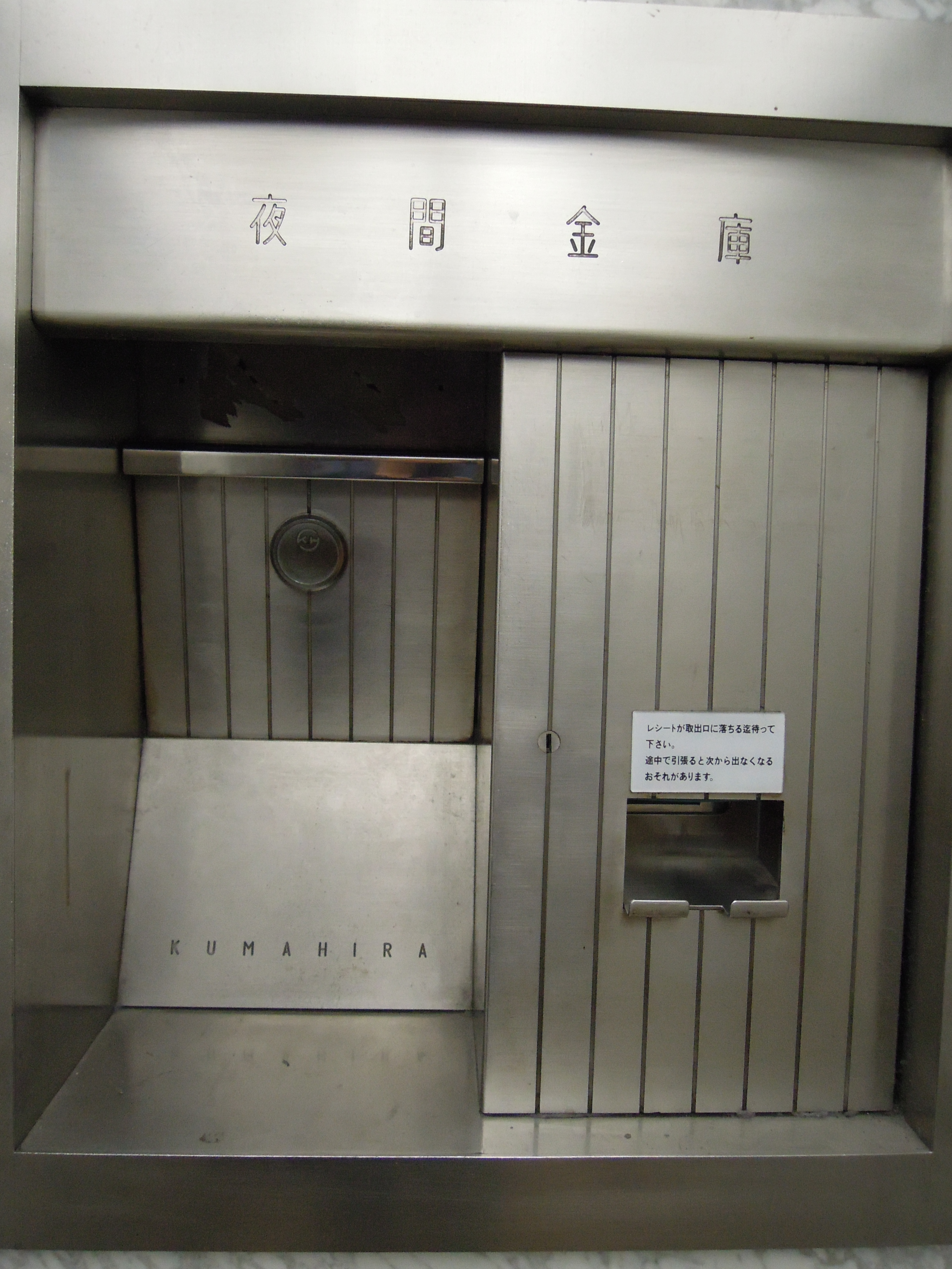 夜間金庫 KUMAHIRA